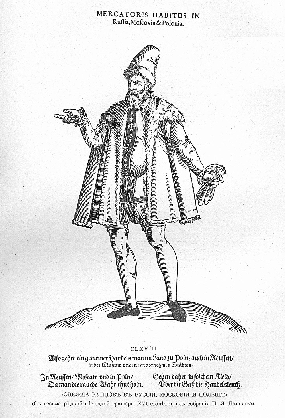 Адзенне купцоў у Русіі, Масковіі і Польшчы. З вельмі рэдкай нямецкай гравюры 16 стагоддзя, са збору П. Я. Дашкава